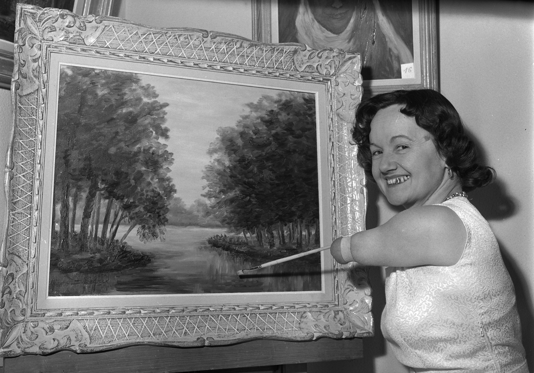 intérieur d'un appartement toulousain. Le 4 Mars 1963. Vue du peintre Denise Legris en train de peindre un tableau.